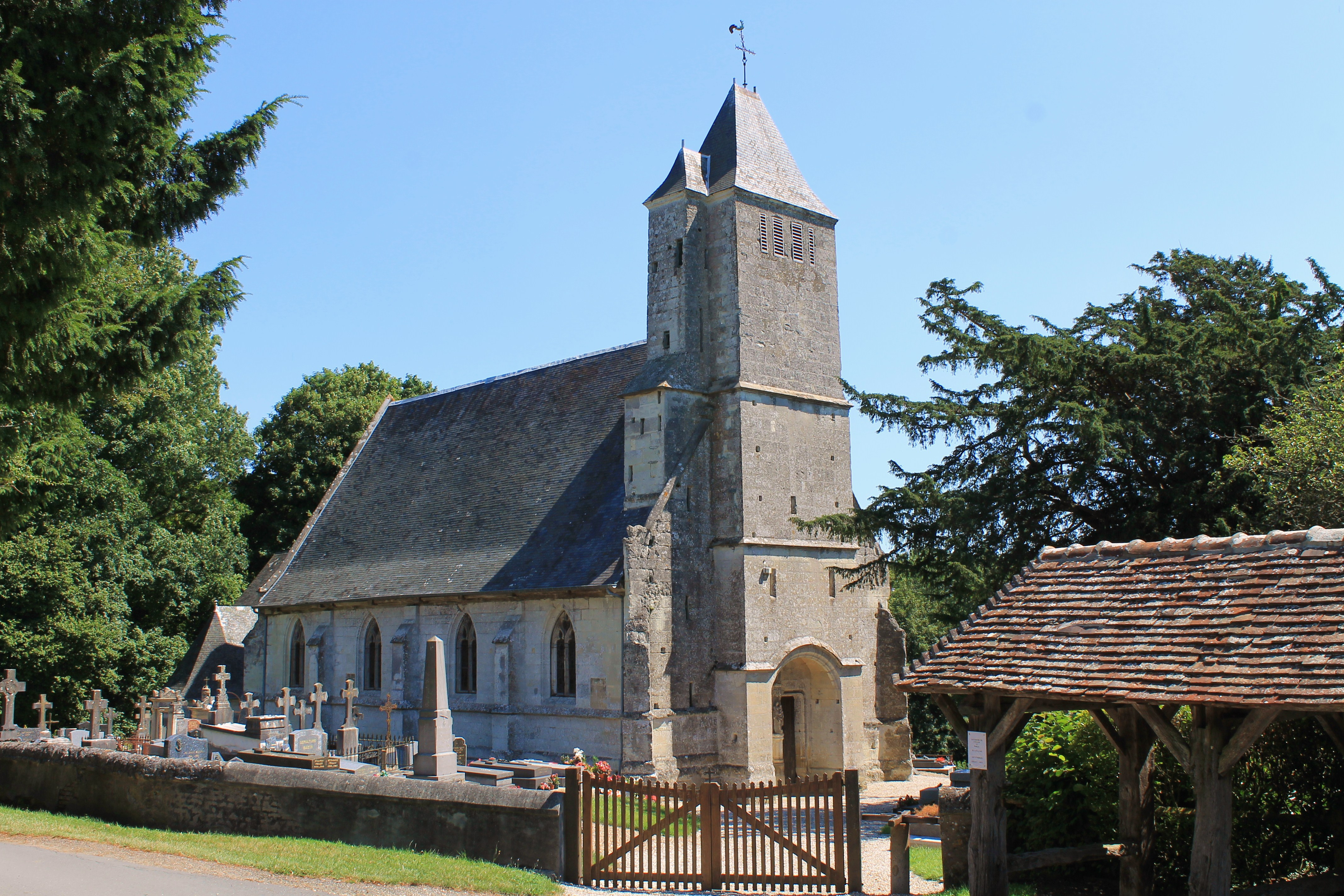 Église Saint-Pierre de Saint-Pierre-Azif (Calvados)